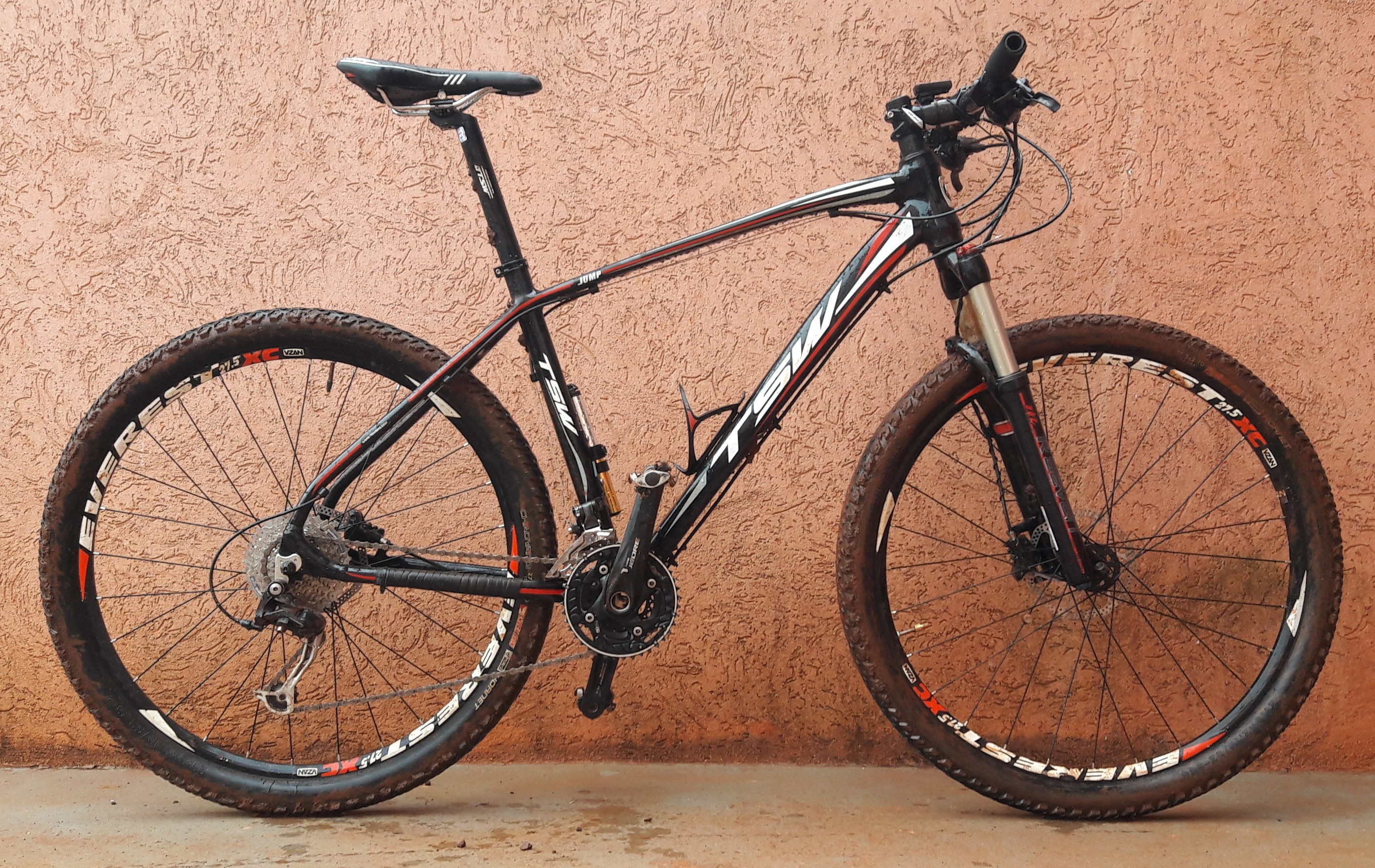 MTB TSW